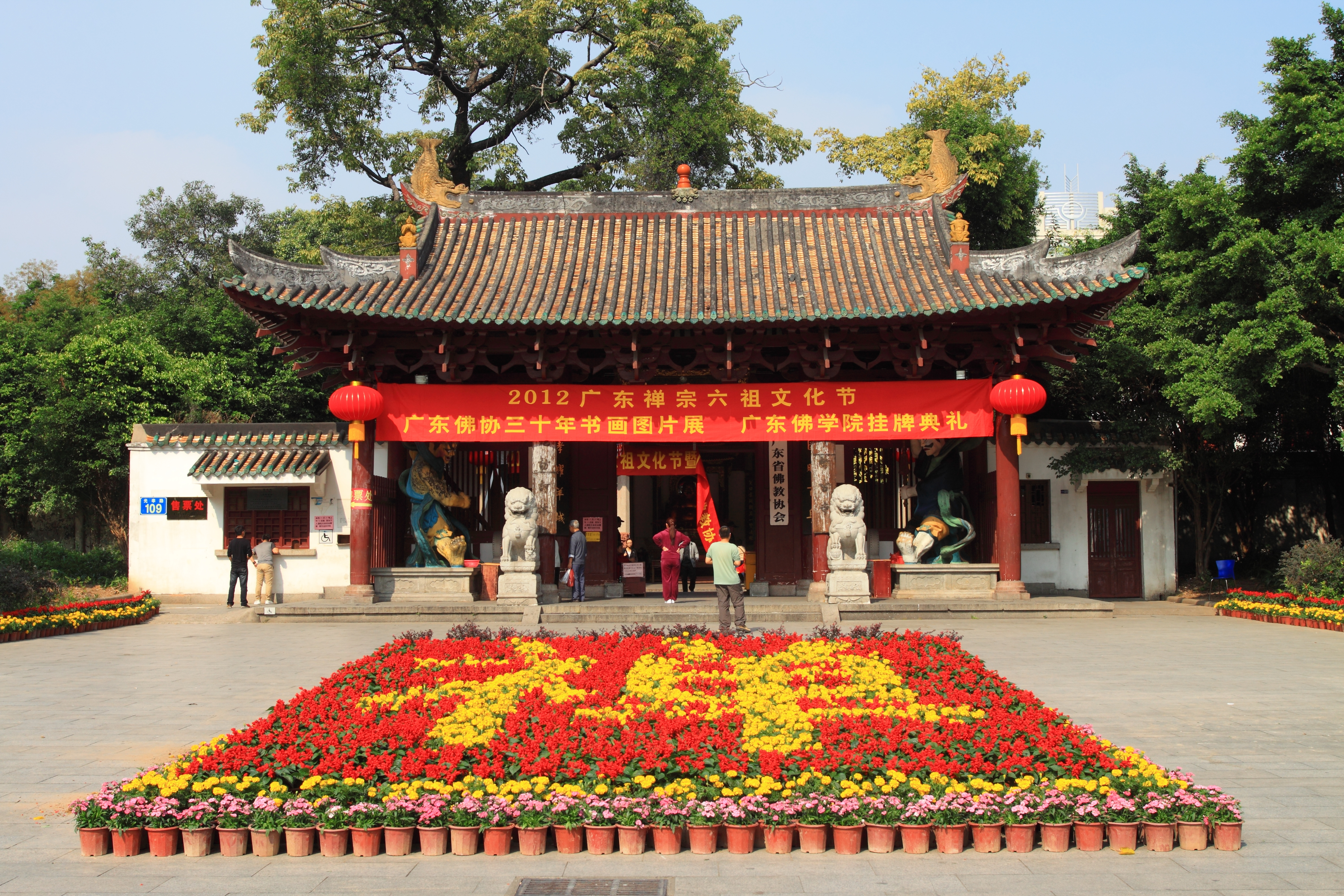 广州光孝寺 —— 山门